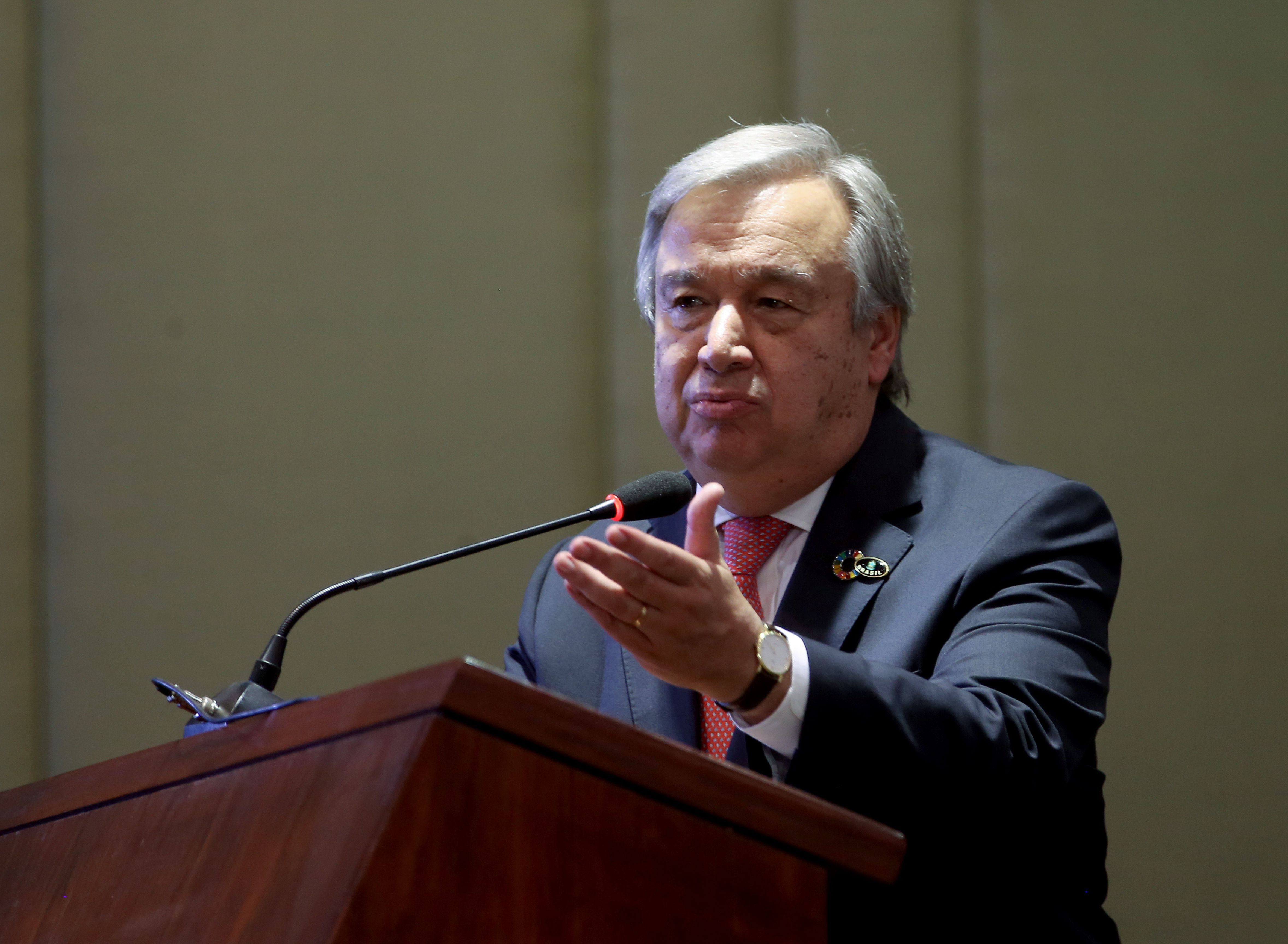 Brasília - O secretário-geral, eleito, da ONU, António Guterres, discursa durante a abertura da conferência da CPLP